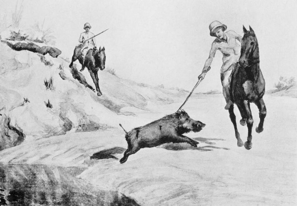 Boar hunting in India.